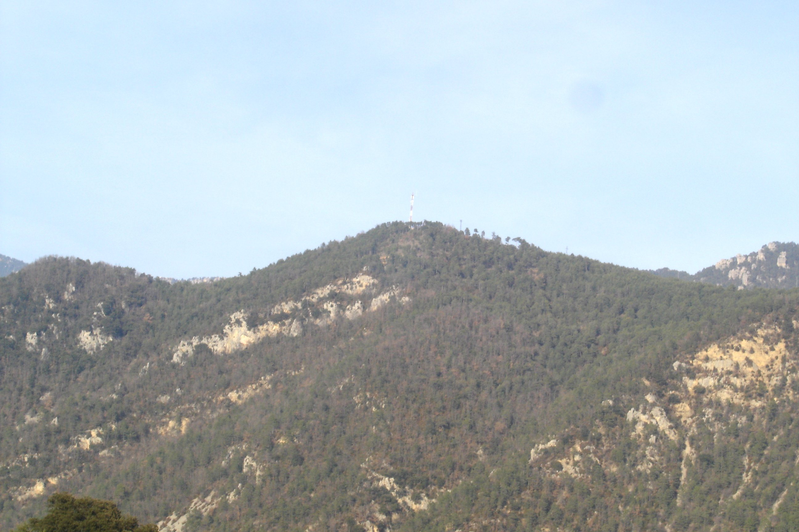 Els dos cims del Serrat del Jou (La Coma i la Pedra, la Vall de Lord, Solsonès) vist des de Sant Llorenç de Morunys (vessant sud-oriental).